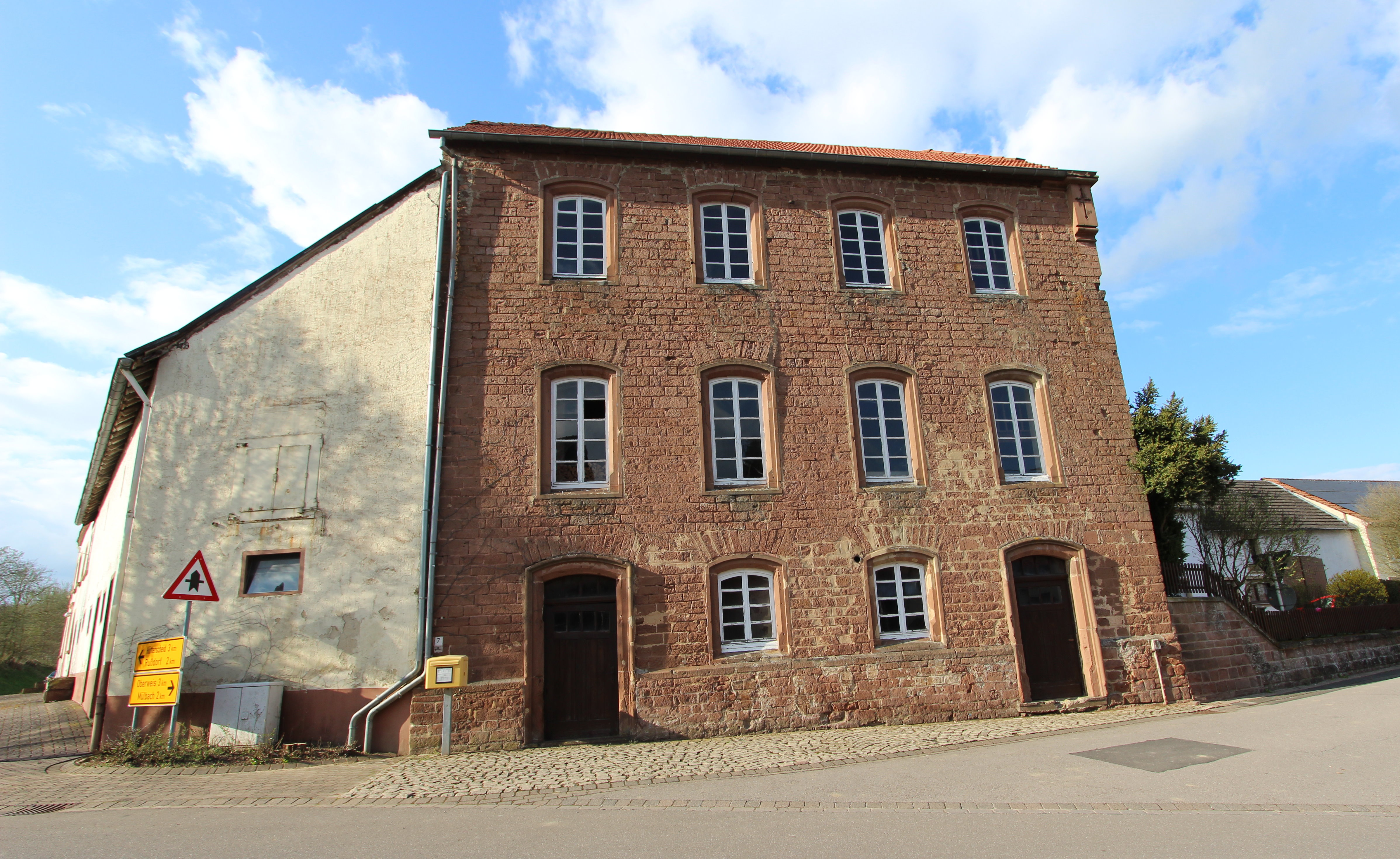 54636 Baustert; altes Schulgebäude Kirchstraße 20 und Haus Bruchweg 2. Blickrichtung aus Süden. Aufnahme von 2016